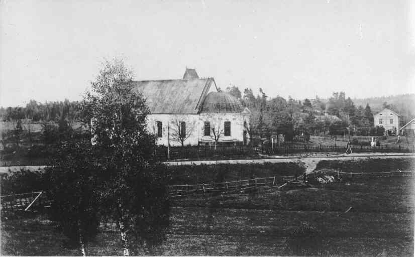 Huddinge kyrka mot norr. I bakgrunden syns Huddinges första fasta folkskola. Bilden ursprungligen från 1865 (reprofotografi av H. Andersson, 1931).